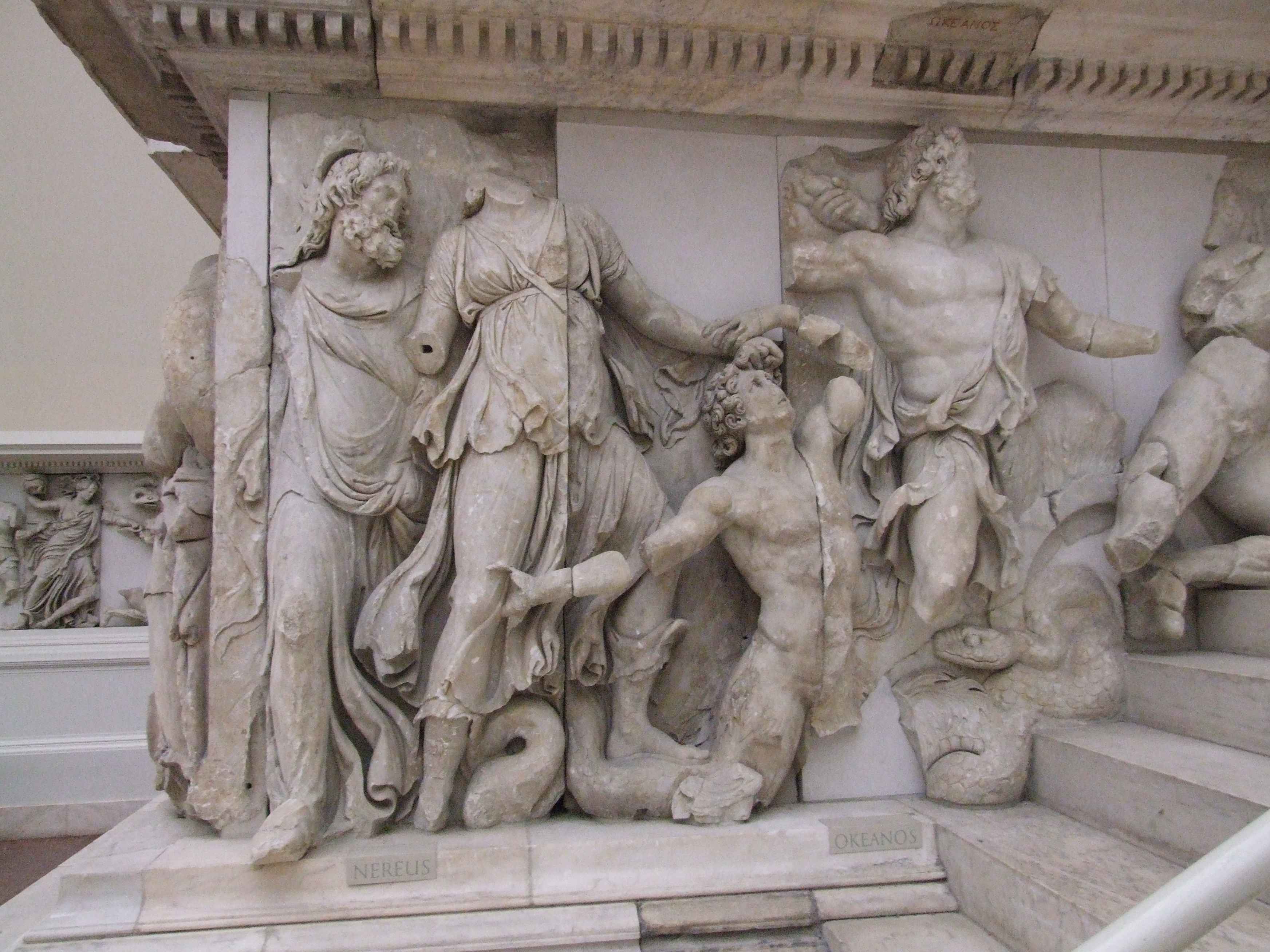 Pergamonmuseum Berlin, Pergamonaltar, Gigantomachie, Nereus, Doris, Okeanos contra Giganten